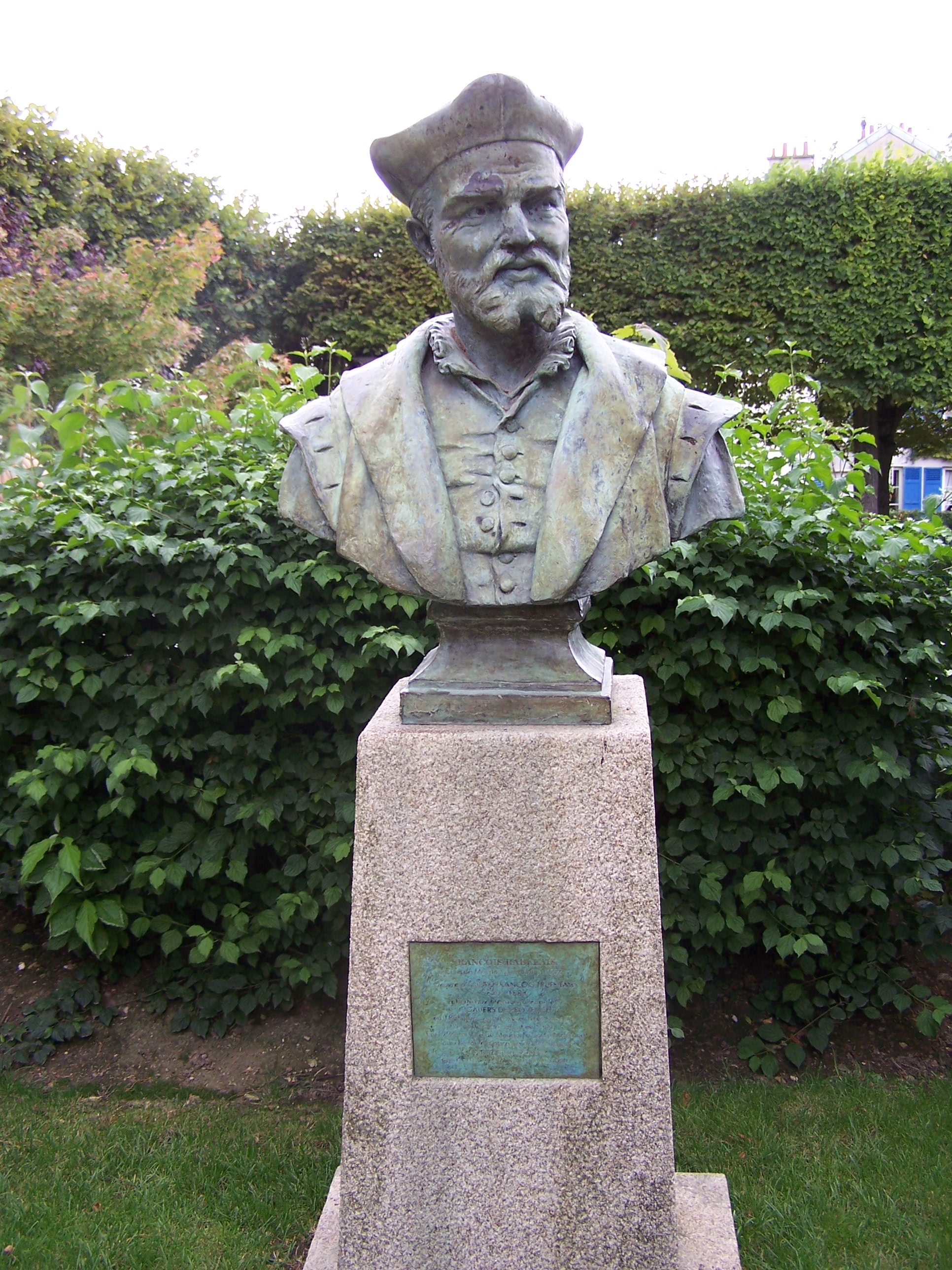 François Truphème, Monument à François Rabelais, parc de Meudon (Hauts-de-Seine, France). François Truphème (1820–1888) Alternative names Andre Francois Joseph Trupheme; André François Joseph Truphème; François André Joseph TruphèmeDescriptionFrench sculptorDate of birth/death 23 April 1820 22 January 1888 Location of birth/death Aix-en-Provence ParisWork location Aix-en-Provence Authority control : Q3085939 VIAF: 49094607 ISNI: 0000 0000 6706 7390 ULAN: 500000808 LCCN: nr92036323 Léonore: LH/2636/75 WorldCat creator QS:P170,Q3085939